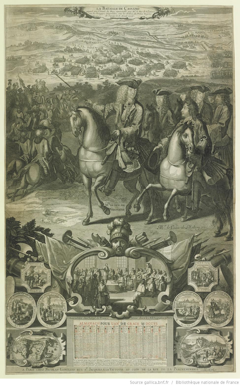 Almanacco per l'anno 1706 raffigurante le vittorie riportate dalle armate francesi in Italia nel corso della campagna del 1705: battaglia di Cassano d'Adda, prese di Verrua, Mirandola, Chivasso, Nizza e dei forti di Saint-Ospice e Montalban